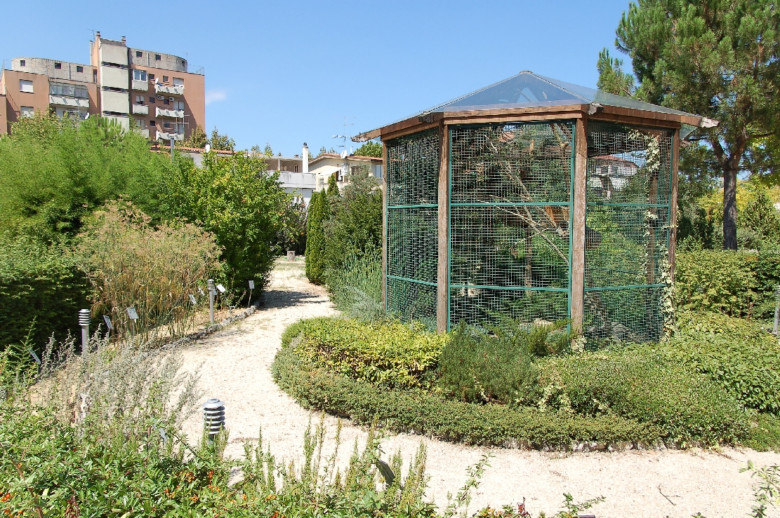 Chieti 2011